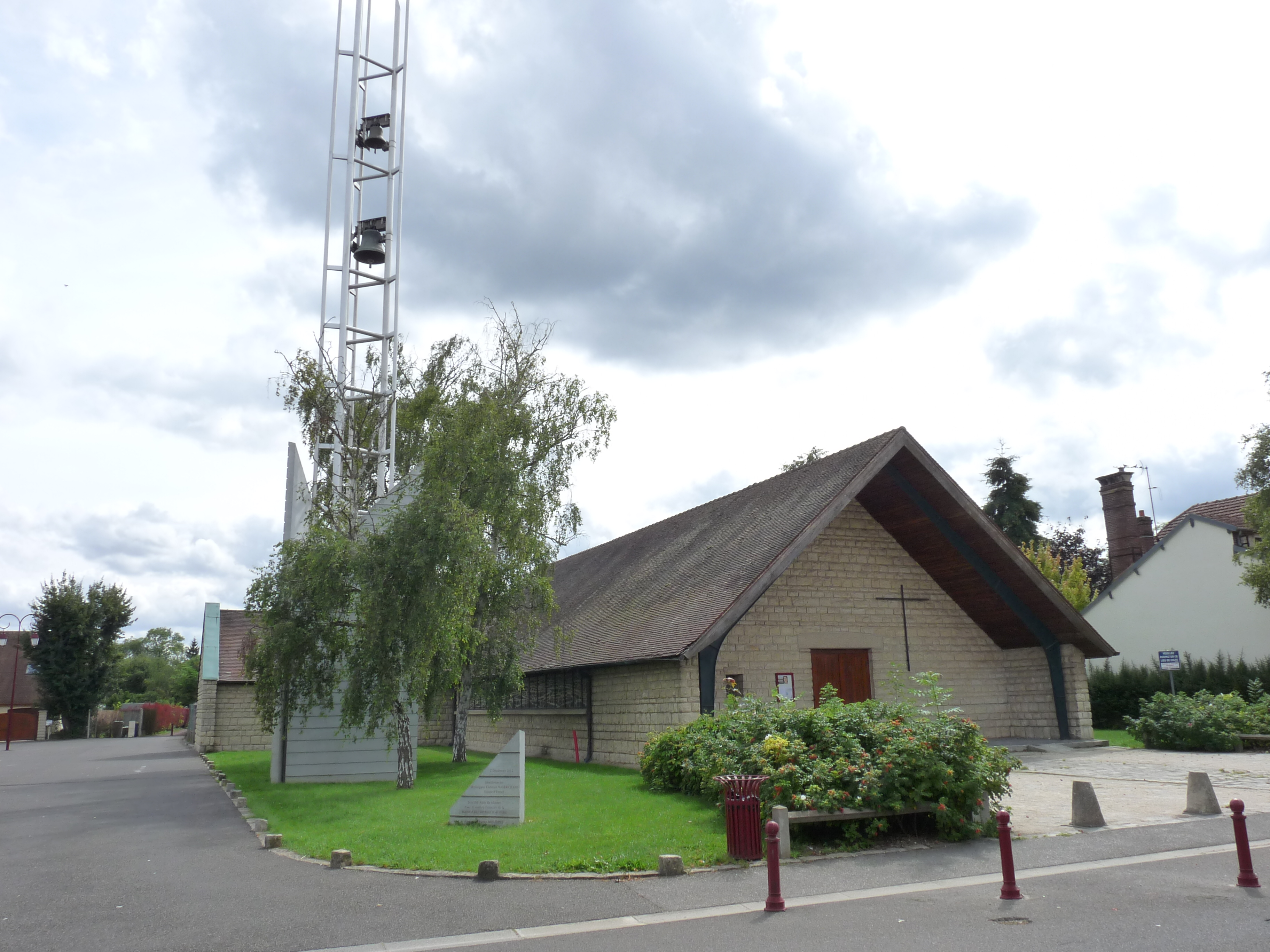 Église Saint-André d'Ézy-sur-Eure